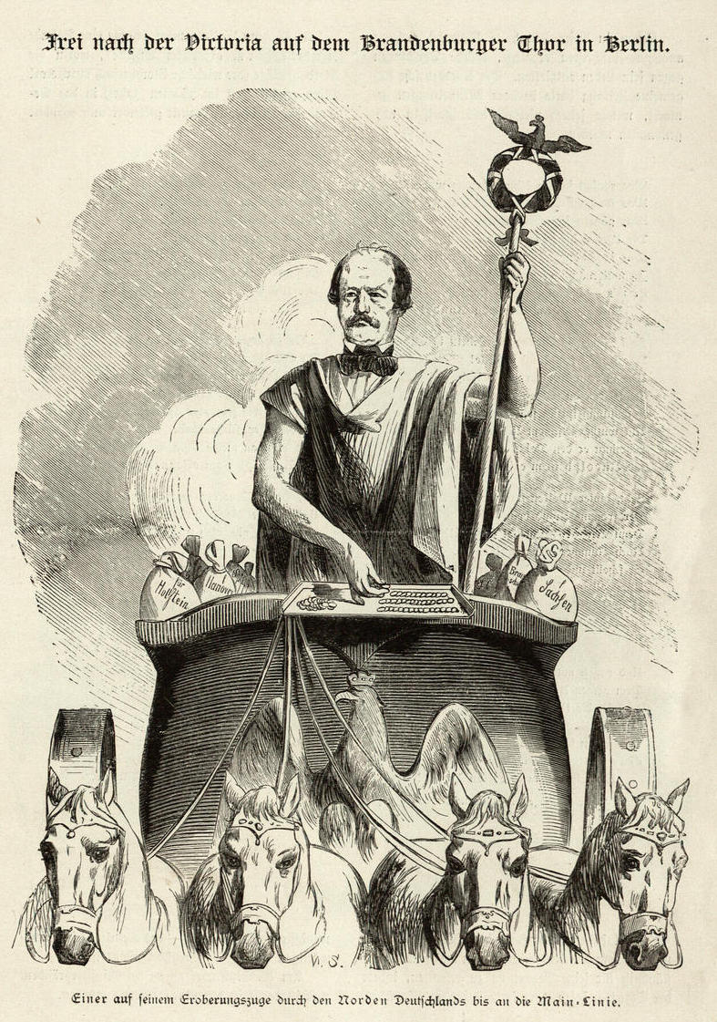 Bismarck-Album des Kladderadatsch. "Frei nach der Victoria auf dem Brandenburger Thor in Berlin." Karikatur zu den Verhandlungen Bismarcks in Norddeutschland nach dem Deutsch-Dänischen Krieg.